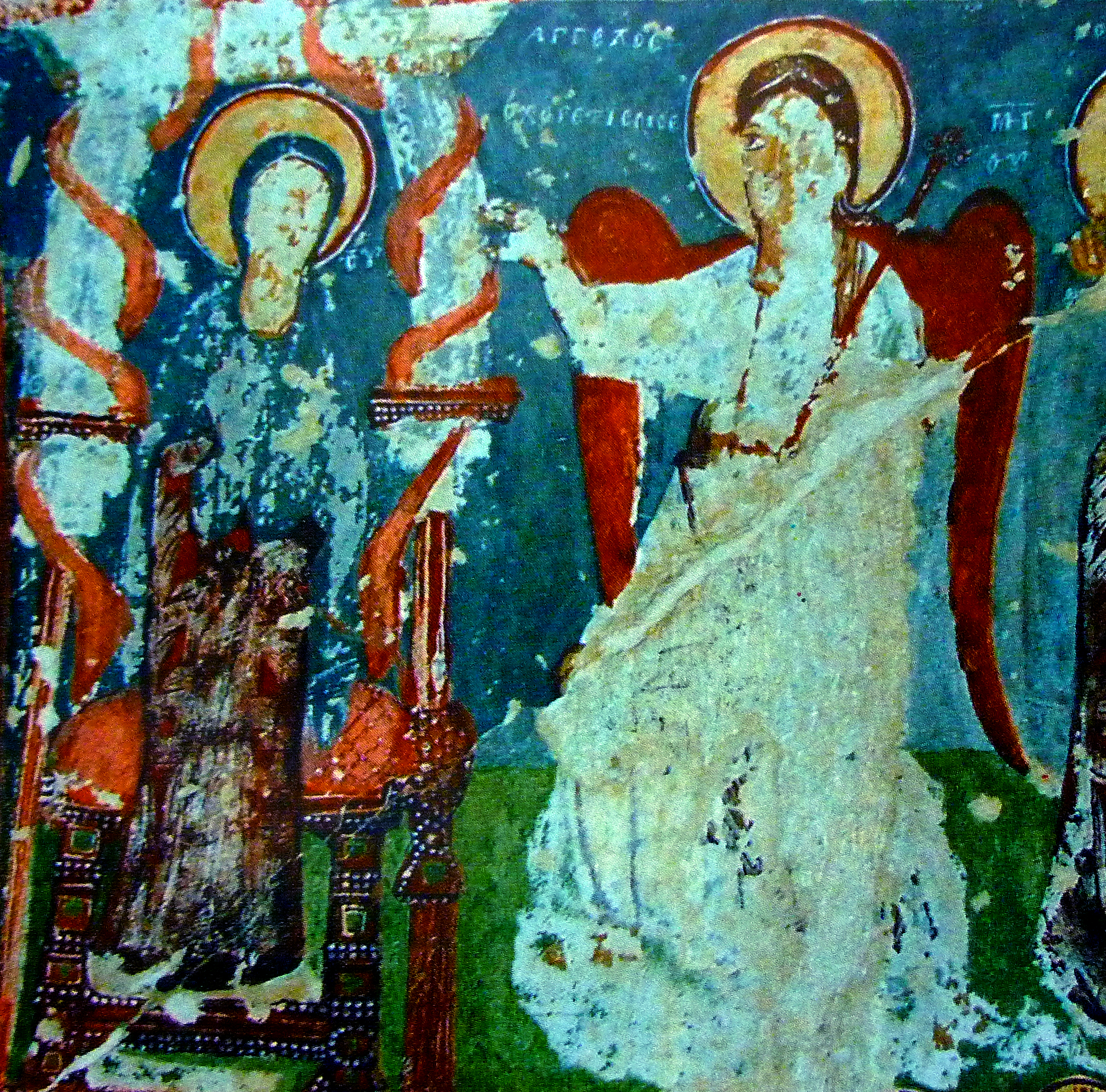 Kappadókia/Göreme Nemzeti Park: El Nazar-sziklatemplom freskója